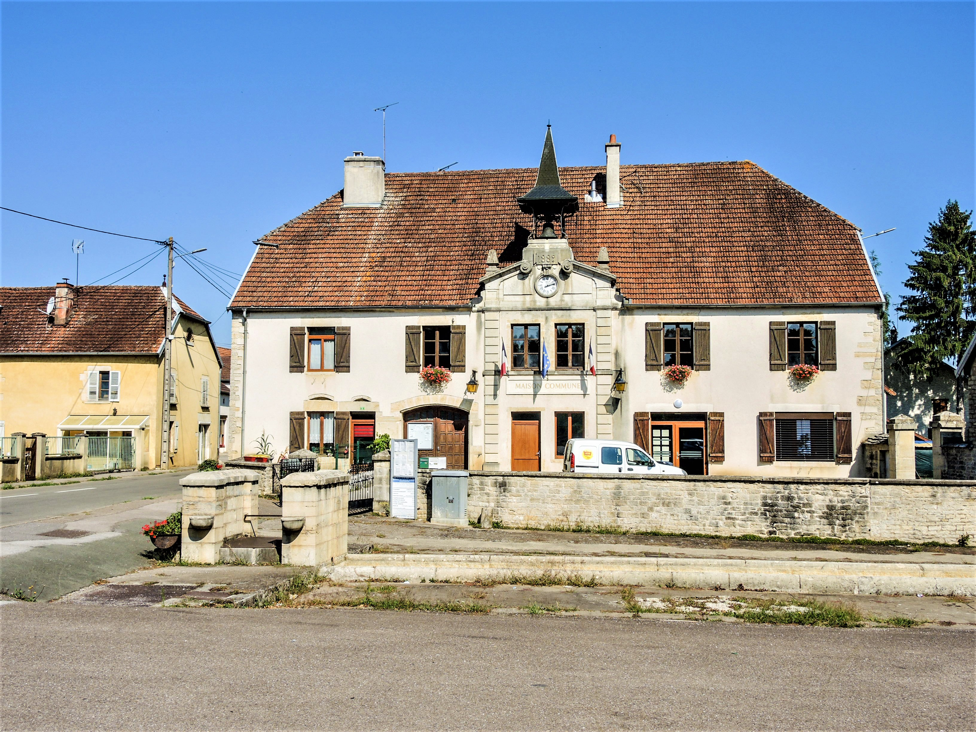 Mairie